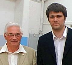 Reinhold Kasper (Sportdirektor des Deutschen Schachbundes) und Peter Heine Nielsen, 2002 in Solingen bei der Deutschen Blitzmannschaftsmeisterschaft im Schach.